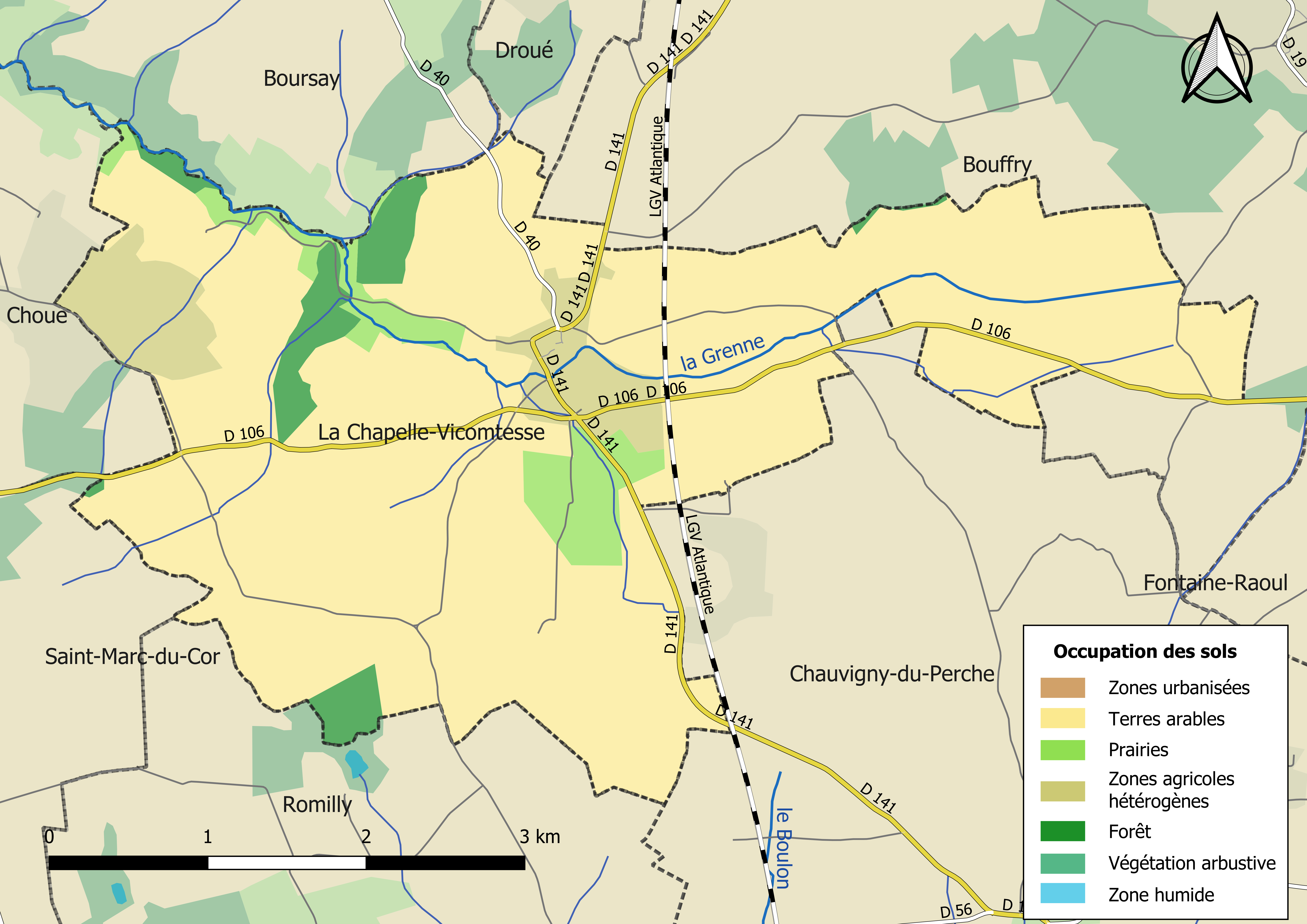 Carte des infrastructures et de l’occupation des sols en 2018 de la commune de La Chapelle-Vicomtesse (France).